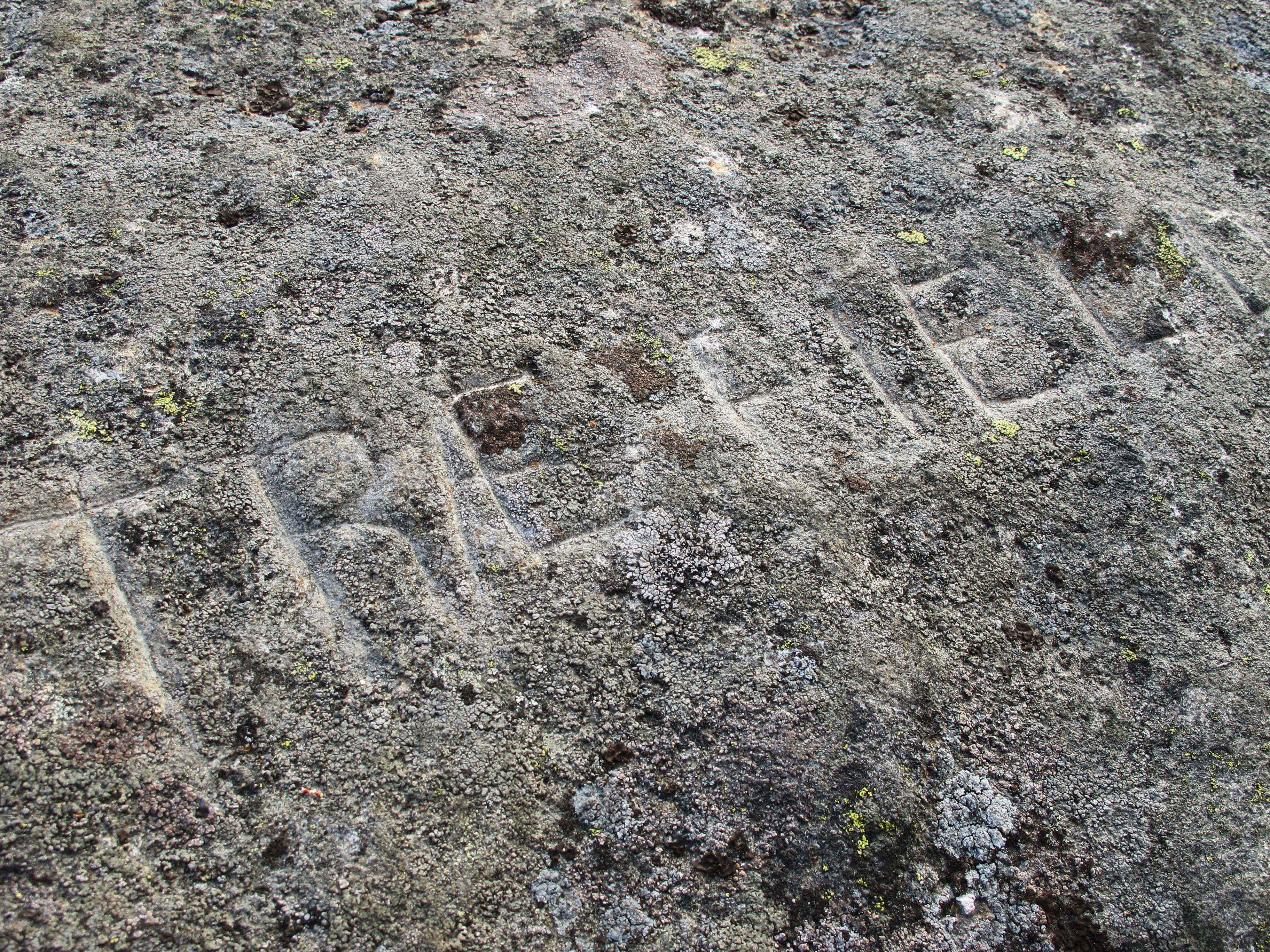 Navnet Træfield hugget inn i fast fjell på toppen av Træfjell ved Ottersland. I dag ligger stedet over en veitunnel på E18 mellom Arendal og Tvedestrand.